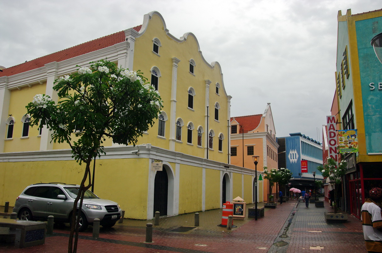 Synagoge, Wilhelmstad, Curaçao